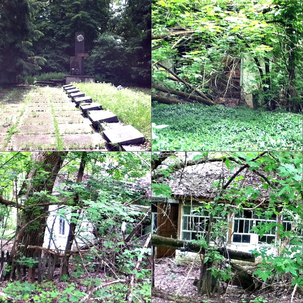 У селі Копачі